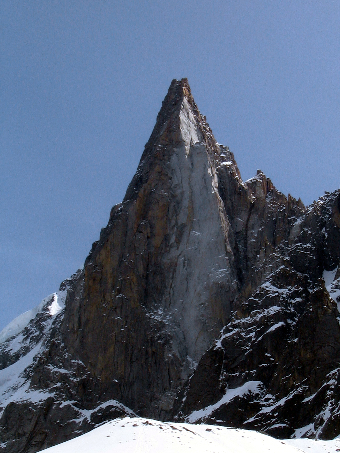 Les Drus en mai 2006. Licensing Catégorie:Sommet des Alpes françaises Catégorie:Massif du Mont-Blanc Catégorie:Montagne